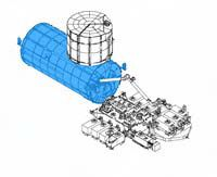 Херметизиран експериментален модул